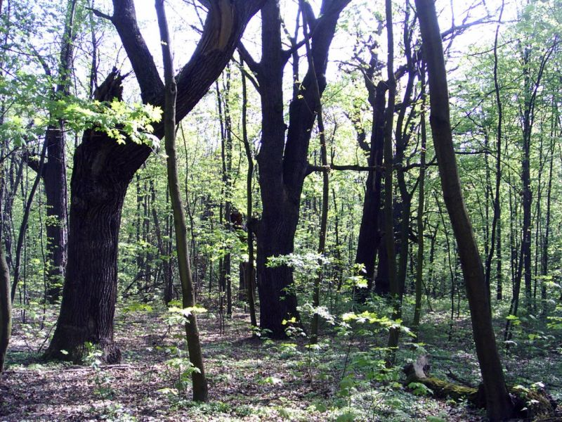 Rezerwat Przyrody Lasek Bielański (Warszawa; Polska)